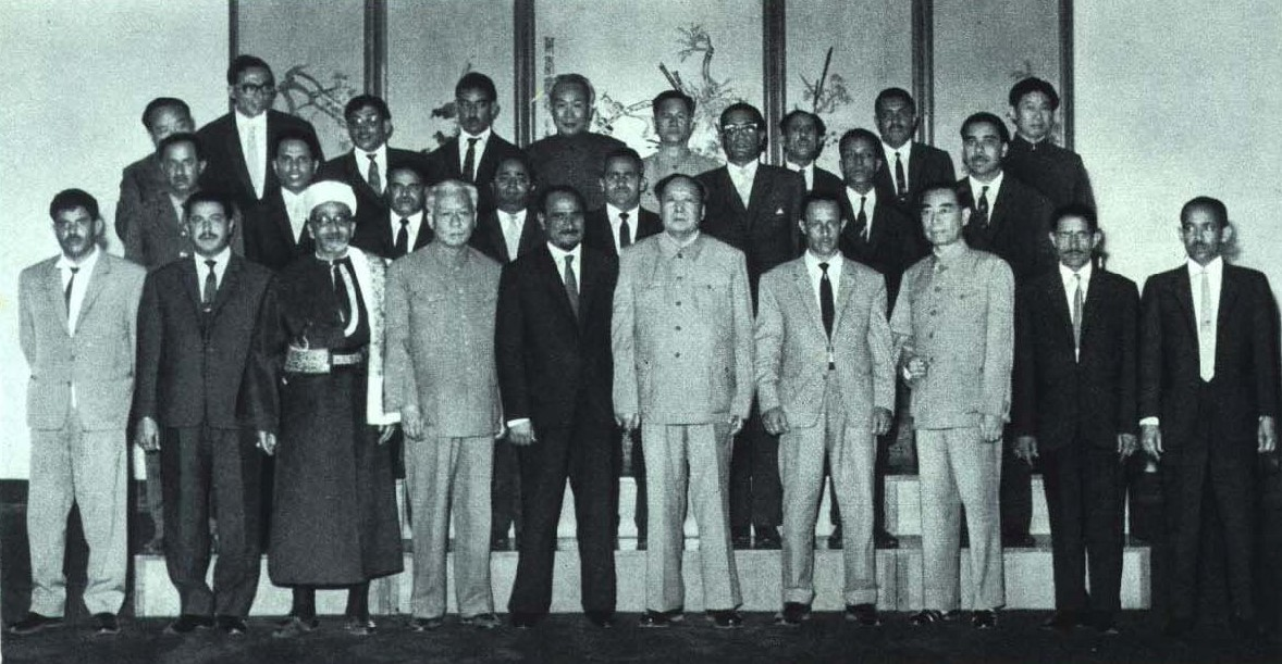 1964-08 1964年 也门主席阿卜杜拉·萨拉勒率团访问中国